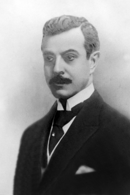 Pintura de José Pires do Rio, prefeito de São Paulo de 1926 a 1930 e ministro dos Transportes, da Agricultura e da Fazenda do Brasil.